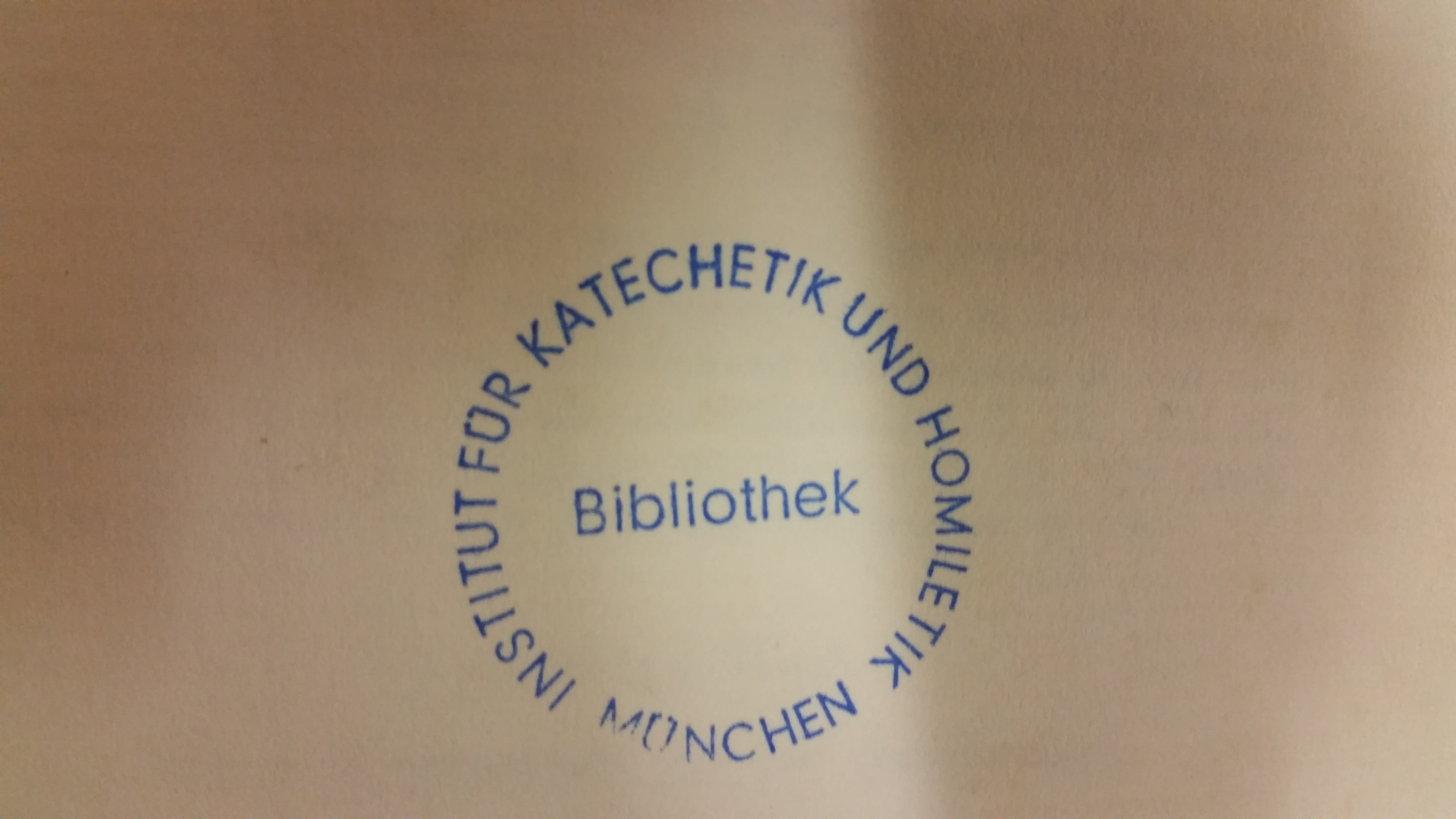 Es-Libris Stempel der Bibliothek des ehem. Instituts für Katechetik und Homiletik (1964-1982) in München. Gemeinfreiheit gründet in der geringen Schopfungshöhe des Stempelbildes und der öffentlichen Zugänglichkeit des Buches in der Biblithek der Katholischen Stiftungsfachhochschule München